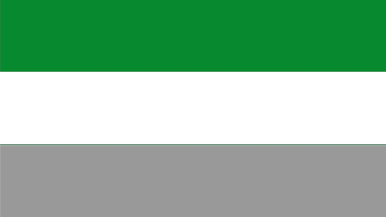 BANDERA DE MONTELIBANO